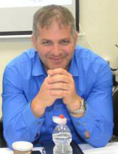 יואב קיש